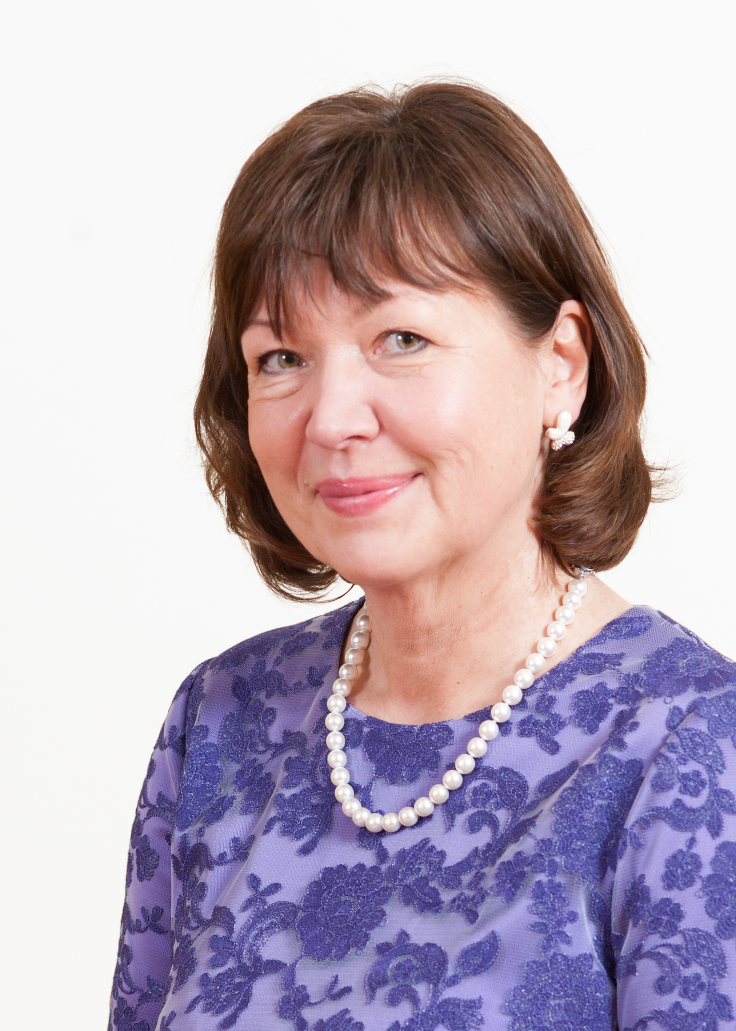 Heljo Pikhof